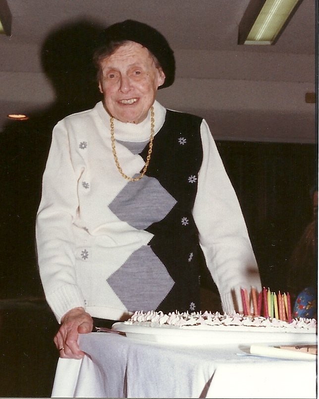 גרדה ביום הולדתה התשעים בירושלים 1999